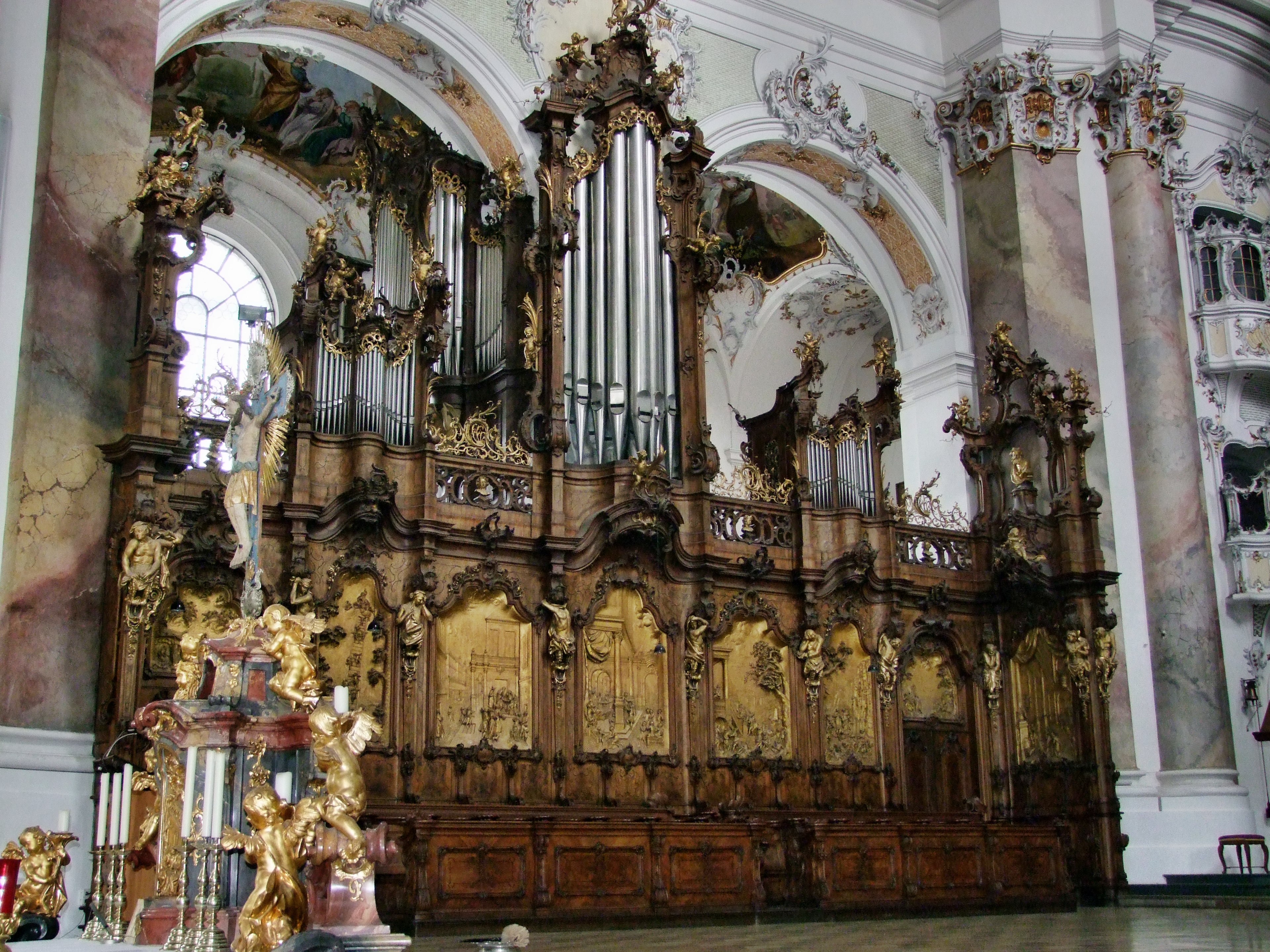 Chorgestühl mit Heilig-Geist-Orgel (F10), Basilika Ottobeuren